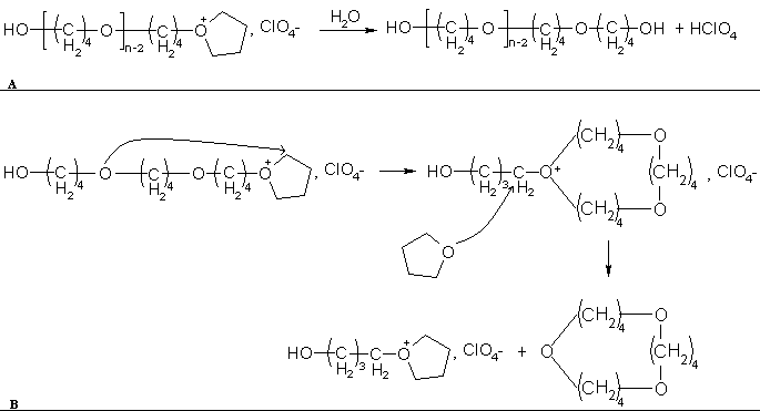 polymérisation cationique